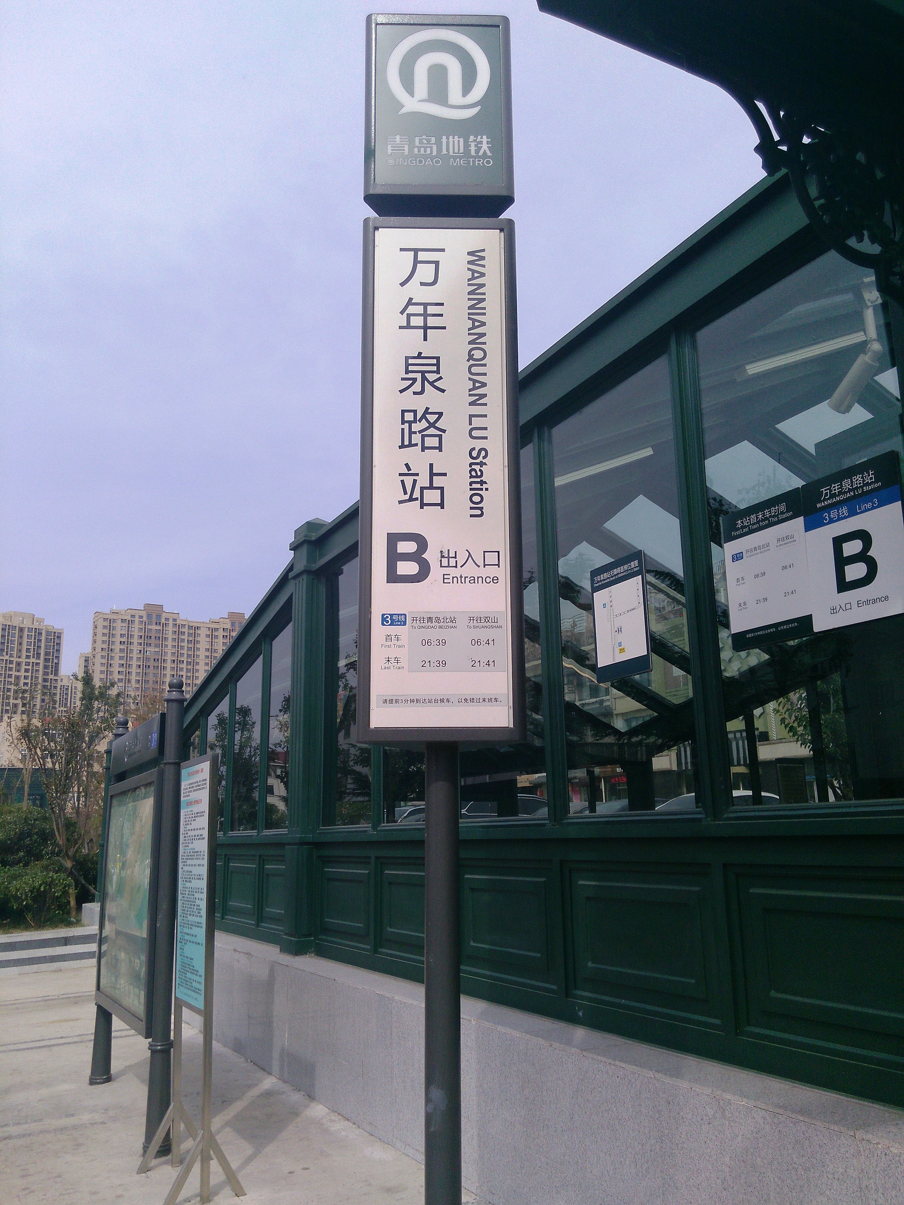 青岛地铁万年泉路站B口站牌